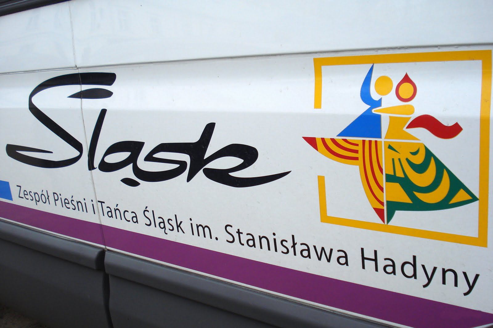 logo Zespołu Pieśni i Tańca Śląsk